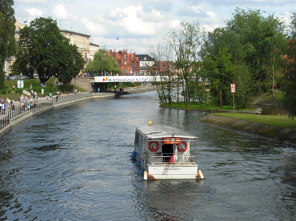 Bydgoski Festiwal Wodny 2012